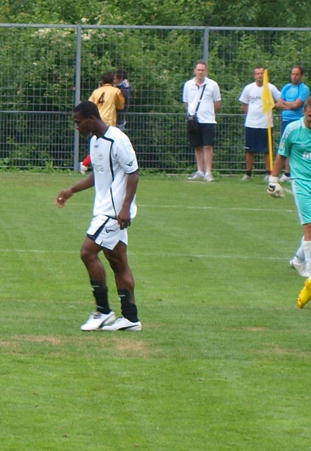 Doubai con la maglia dell'Udinese